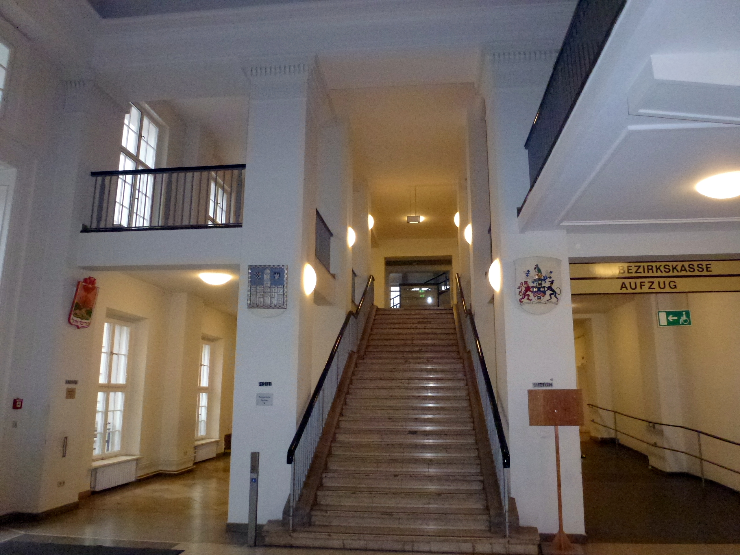 Rathaus Wilmersdorf Eingangsbereich